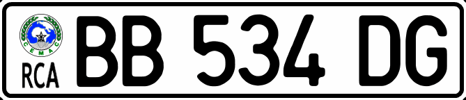 Схематичне зображення номерного знаку